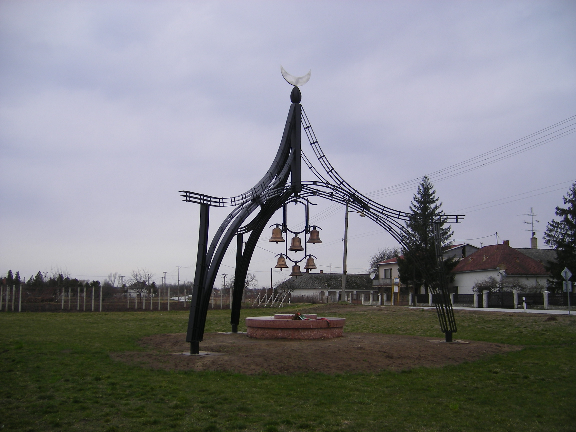 Zsitvatő, a Zsitvatoroki béke emlékműve